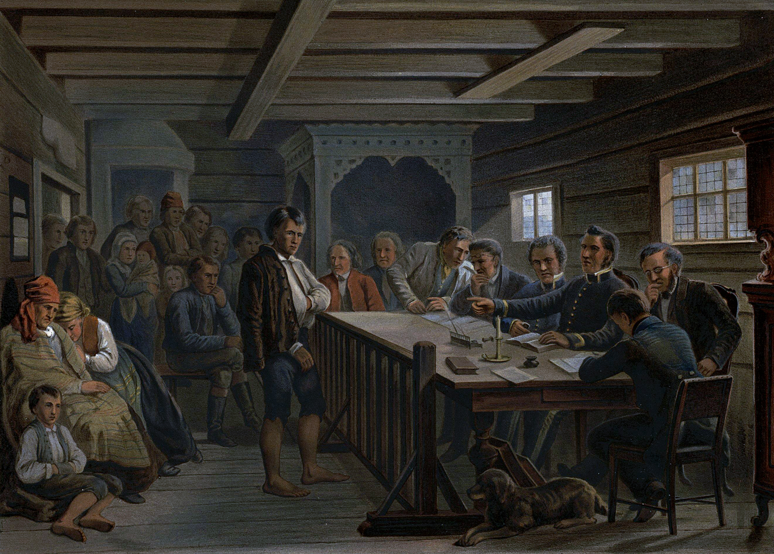 Litografi af Winckelmann & Sönner i Berlin